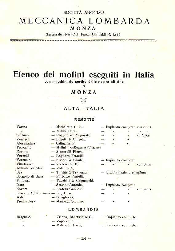 Società Anonima Meccanica Lombarda - Elenco dei molini eseguiti in Italia e all'estero pag. 201